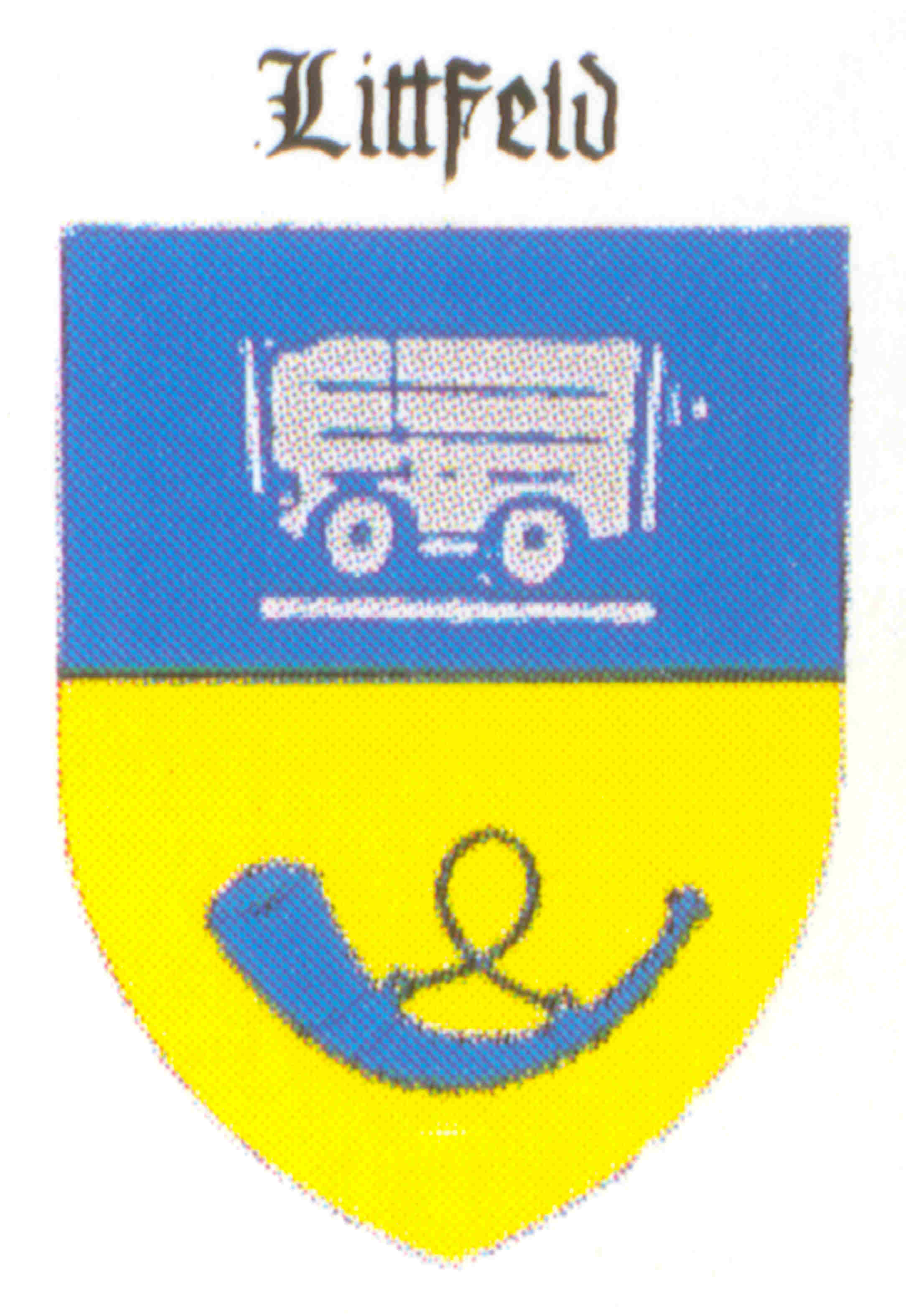 Wappen der 1969 nach Kreuztal eingemeindeten und bis dato selbstständigen Gemeinde Littfeld